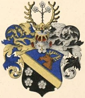 Richteri suguvõsa aadlivapp